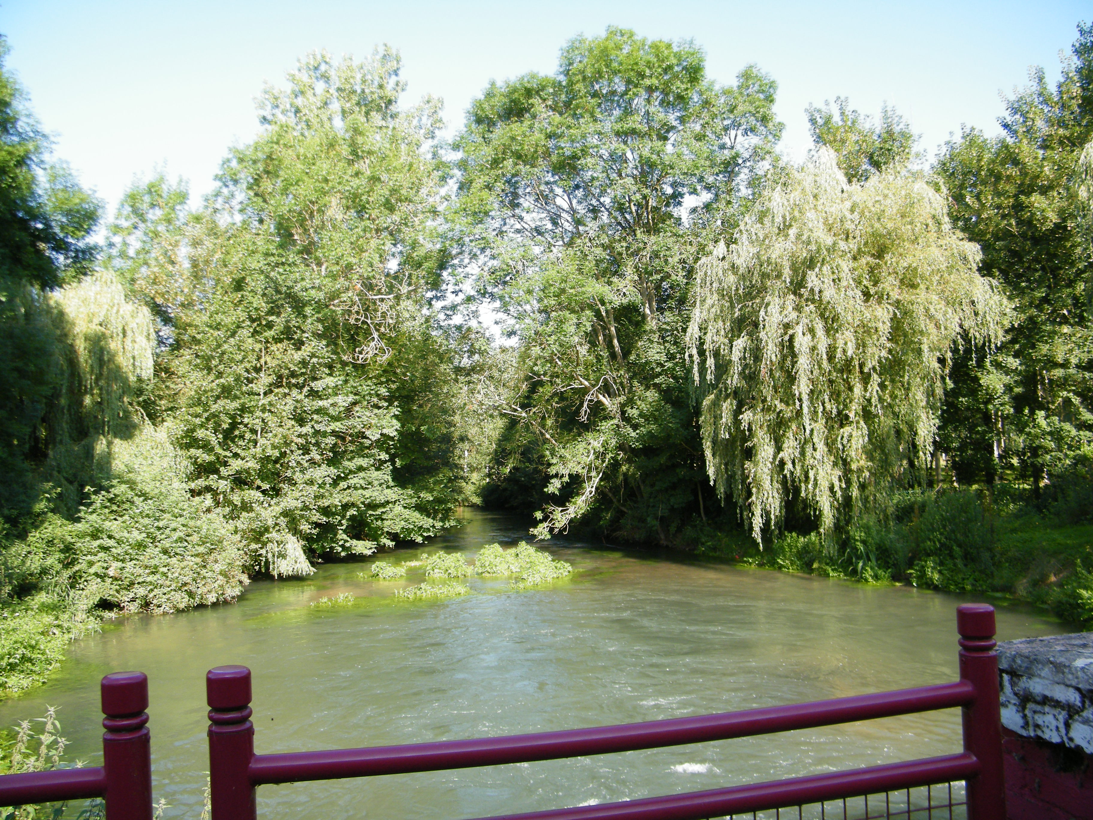 Lieux de pêche à Treux, Somme, France.